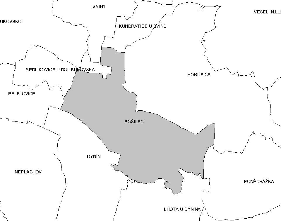 Katastr Bošilce